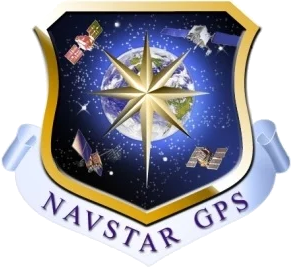 NAVSTAR GPS logo